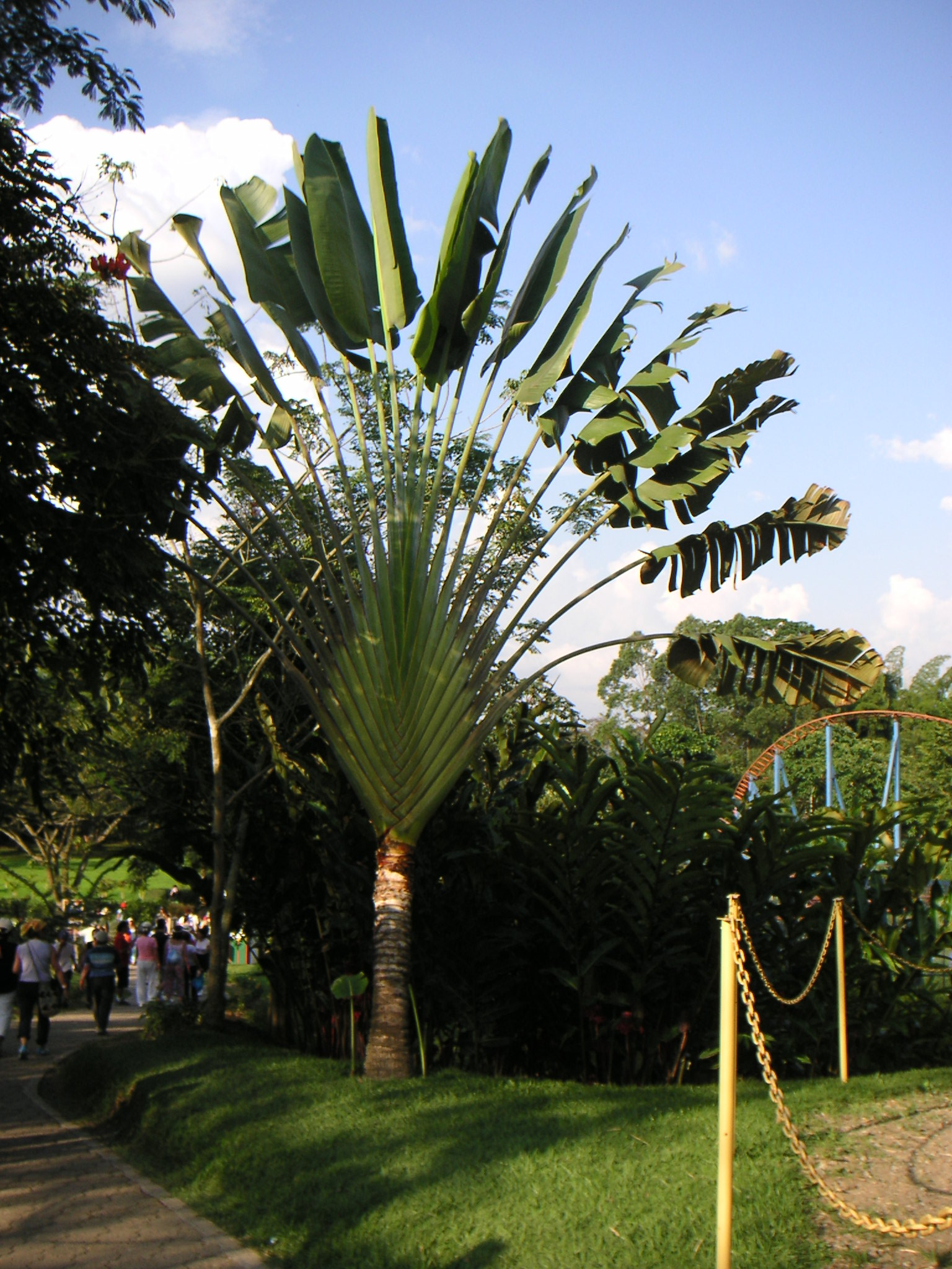 Ravenala madagascariensis, Strelitziaceae